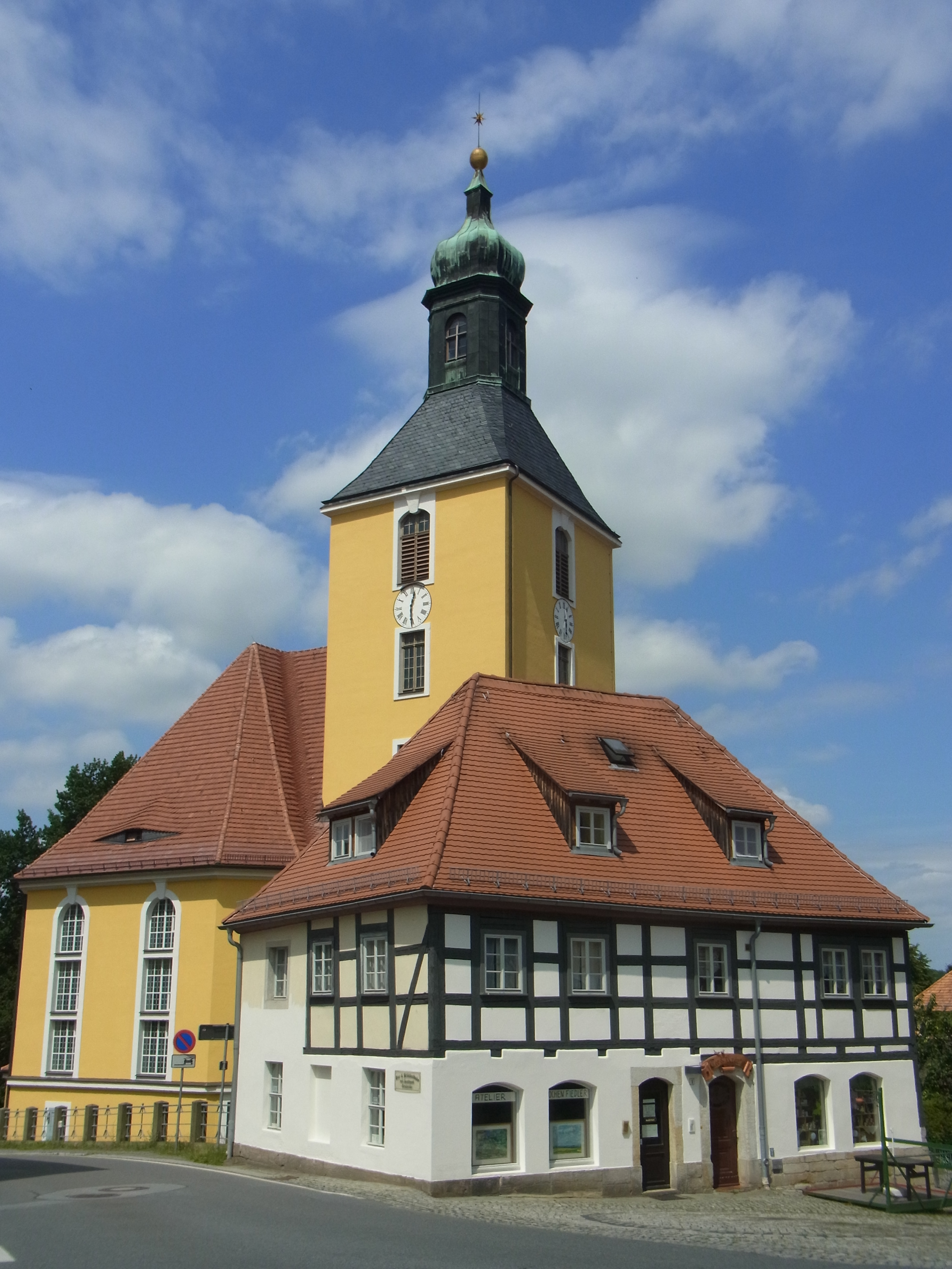 Hohnstein kostel